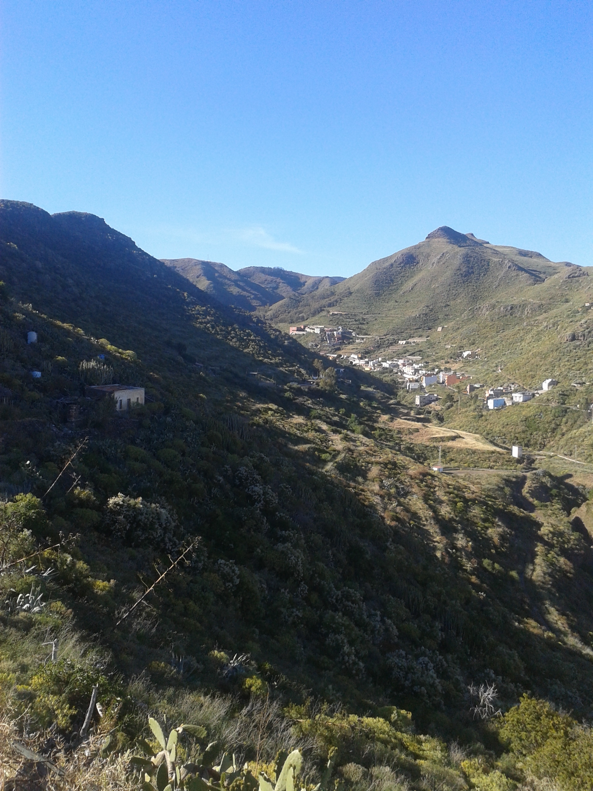 Valle Tabares (La Laguna)